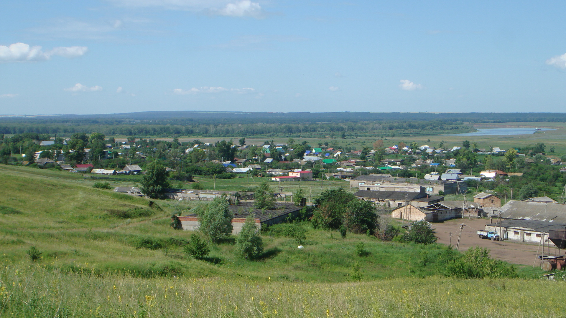 Деревная Удельно-Дуваней в Благовещенском районе Башкортостана